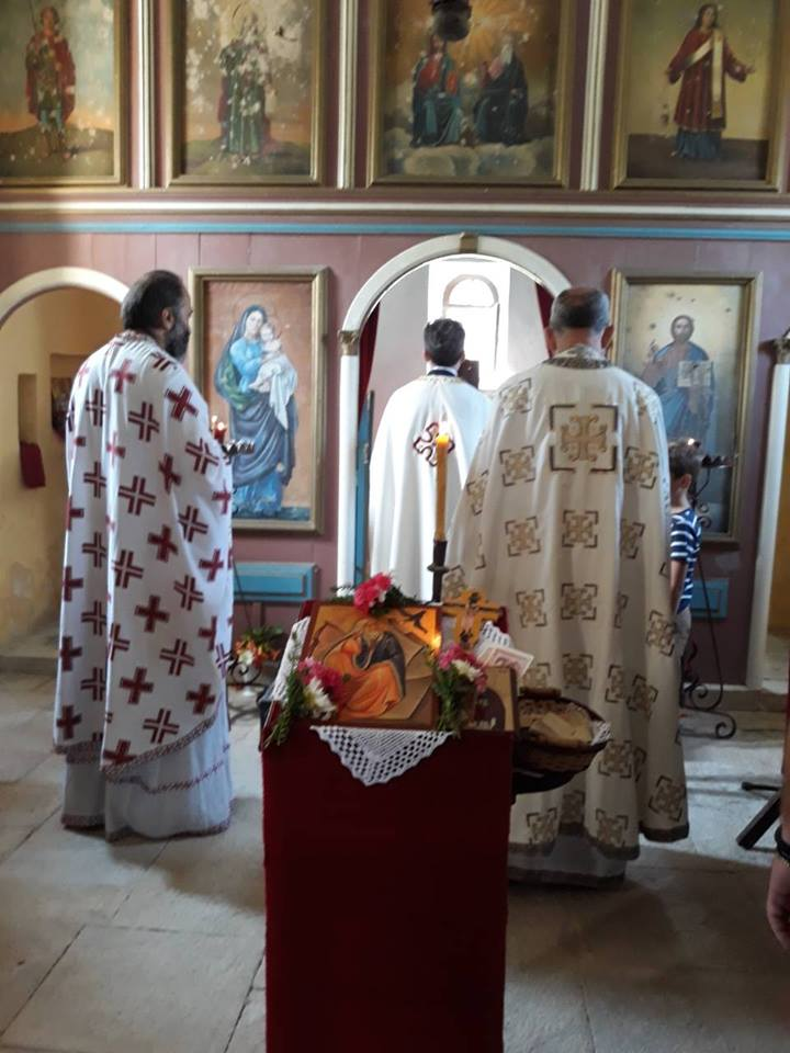 Храм Светог пророка Илије